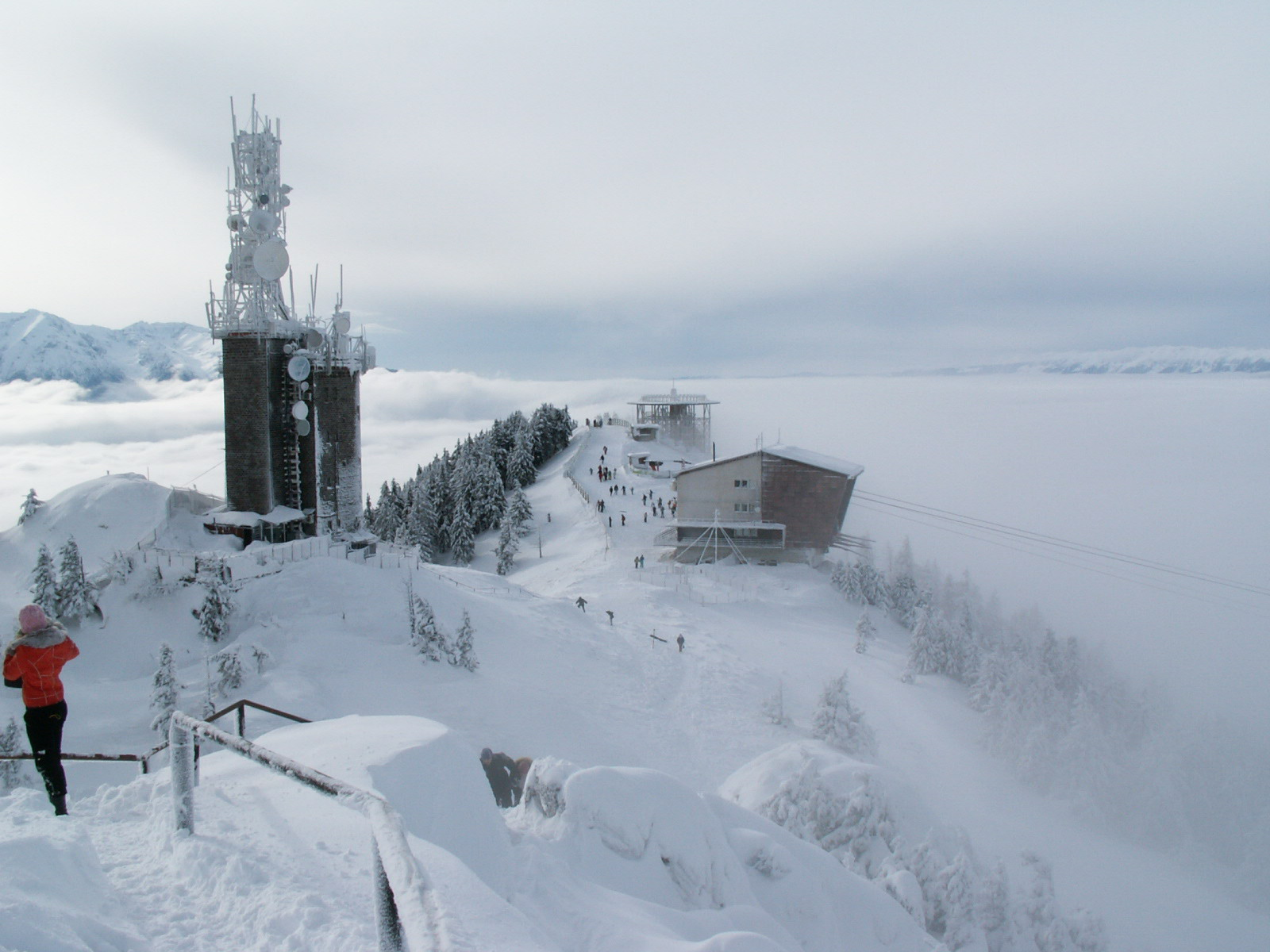 Гора Постэрвару (1060 м), Пояна-Брашов (Румыния)